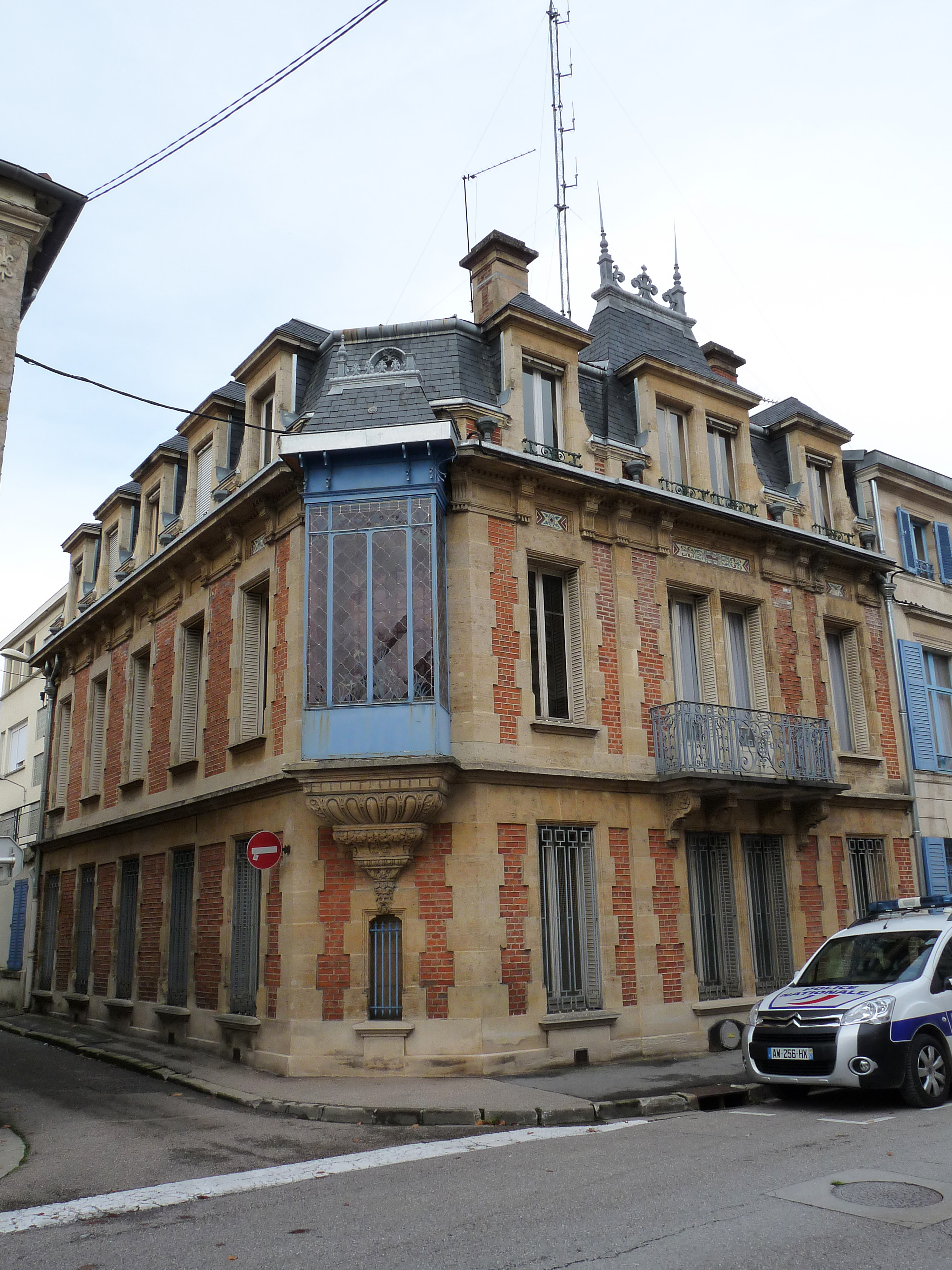 Bar-le-Duc, 59 rue du Bourg : Hôtel de Police, avec oriel